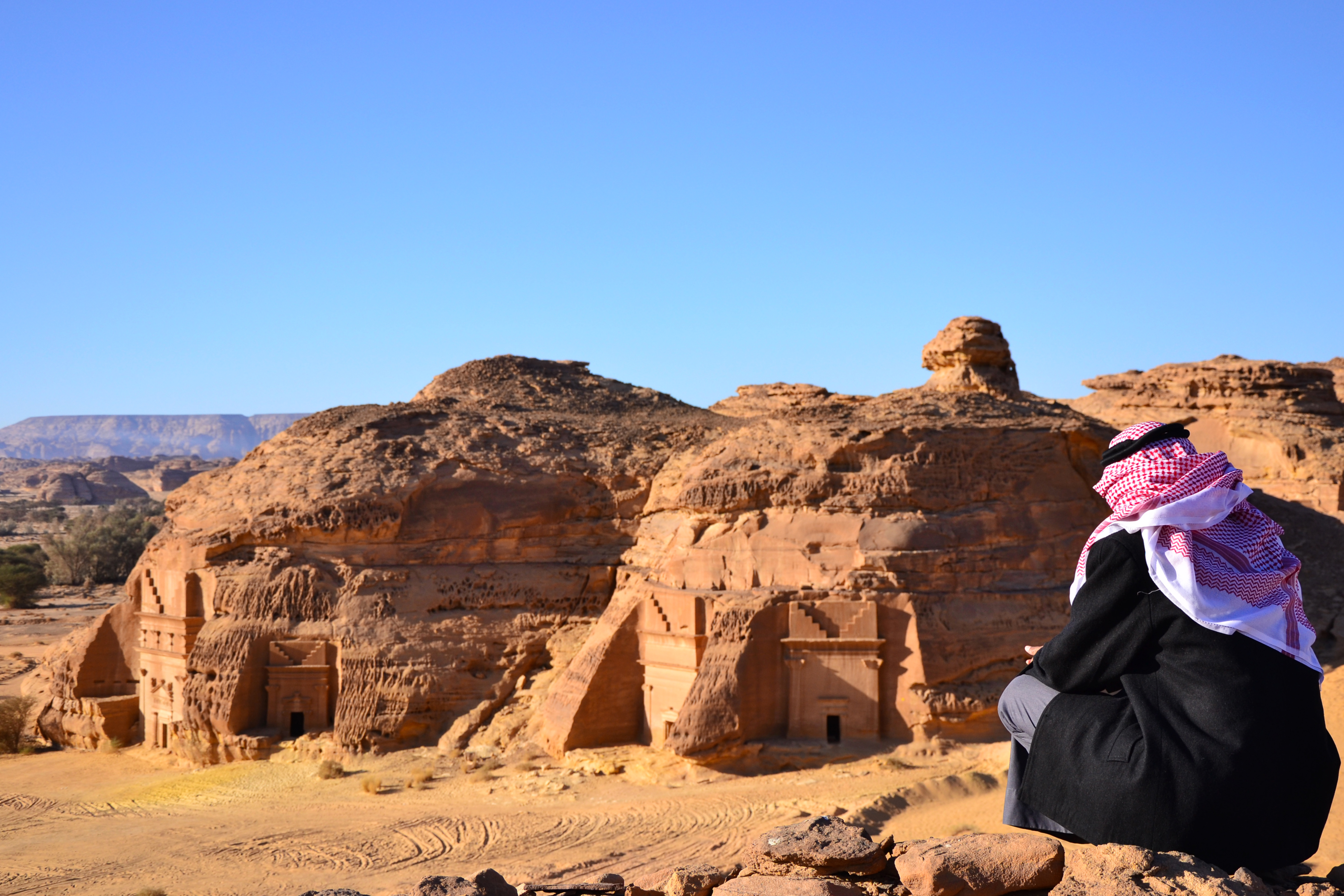 Madain Saleh